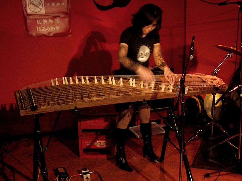 Artist Yagi Michiyo plays a bass koto